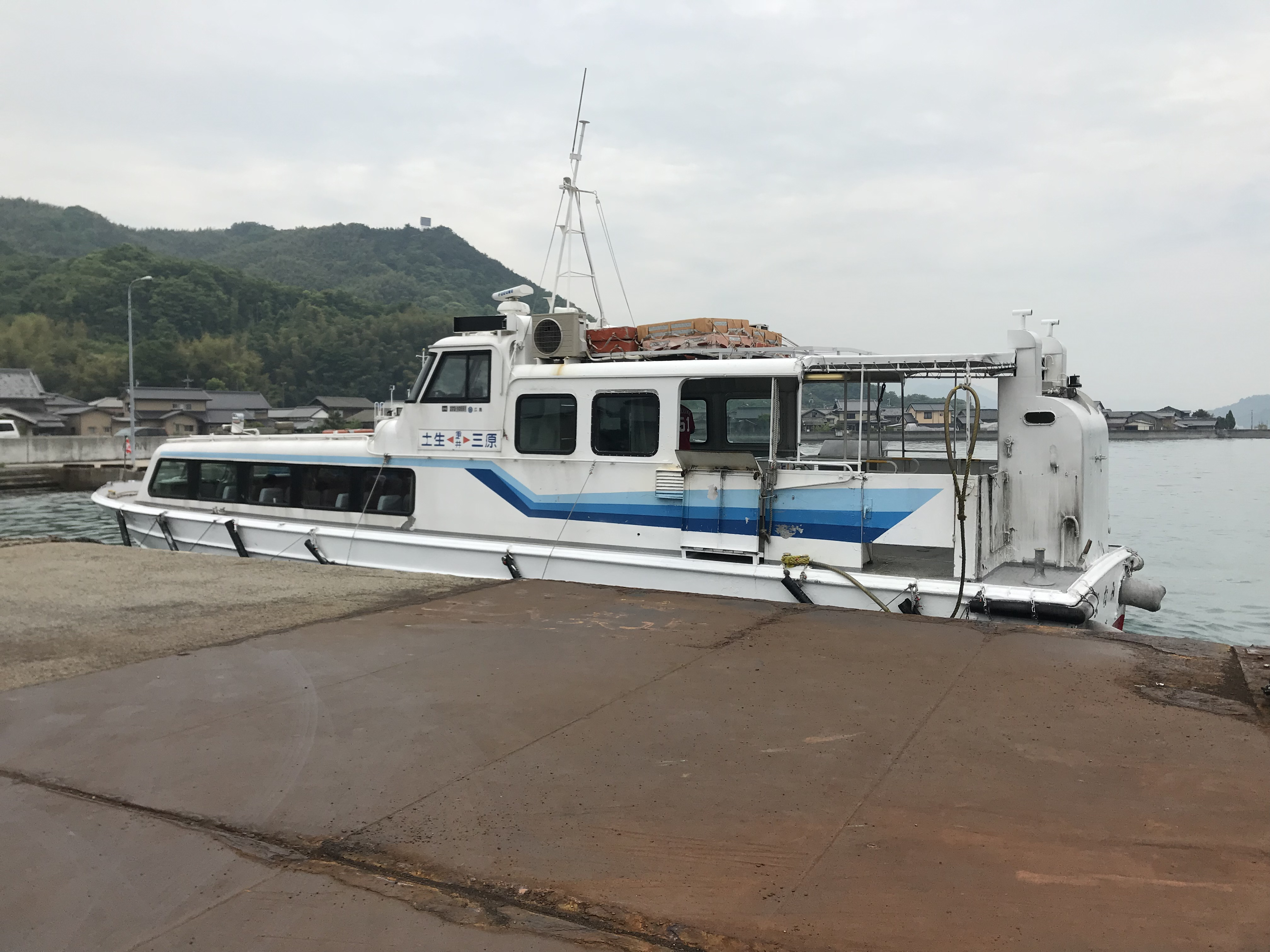 重井西港に到着した土生行き高速船「しまなみ」